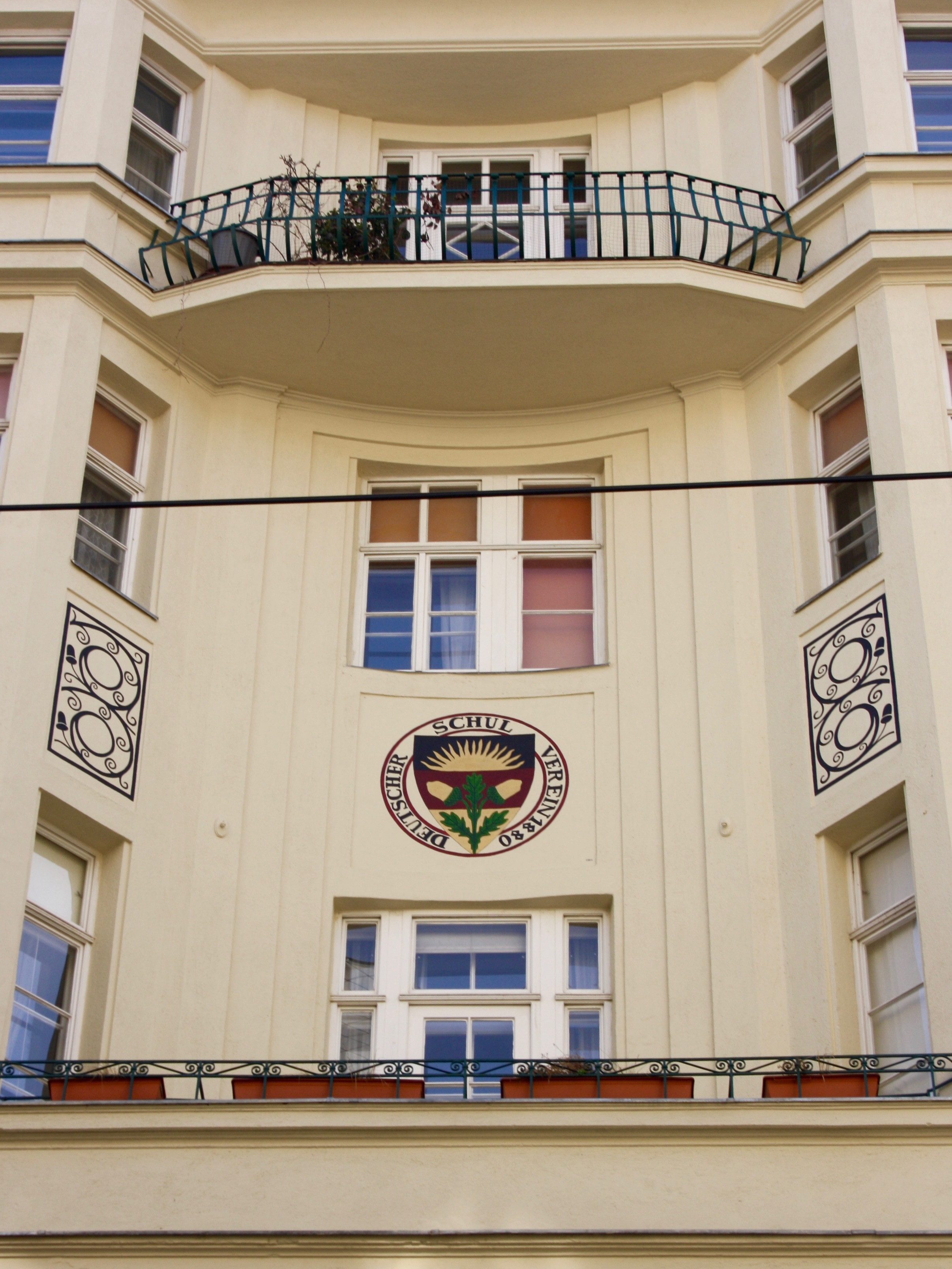 Schulvereinshaus. Fuhrmannsgasse 18A / Florianigasse 39, Wien-Josefstadt.